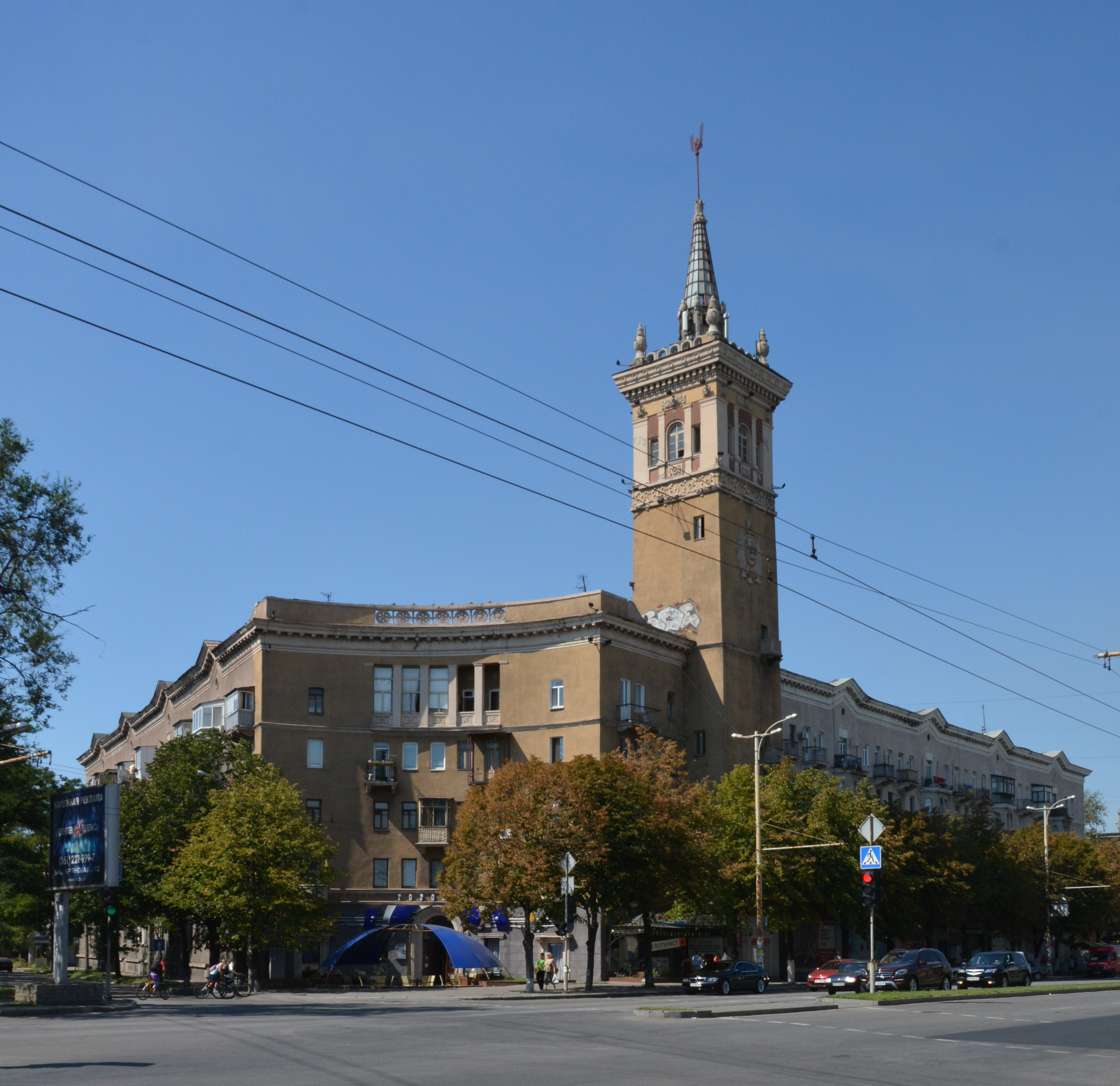 Житловий будинок що формує в'їзд з боку шляхопроводу, архітектори І.Л. Козлінер, Л.Я. Гершович, Запоріжжя, просп. Леніна, 175